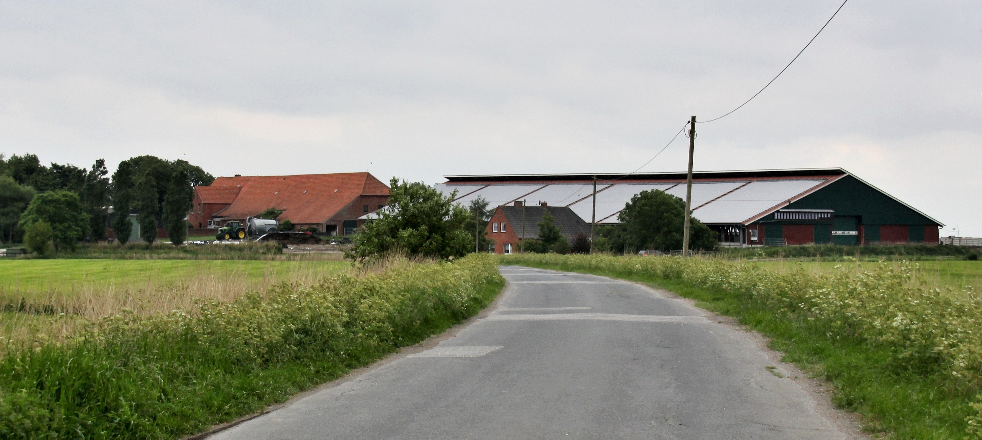 Kloster Appingen - heute ein landwirtschaftlicher Betrieb